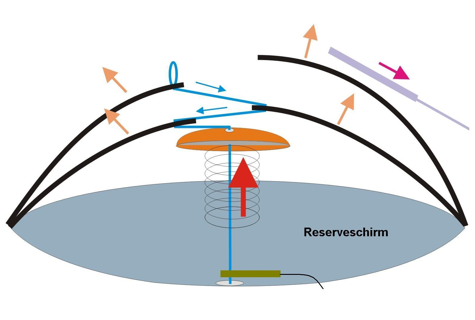 Ein sich öffnender Reservecontainer. Reservefallschirm Öffnungsphase.